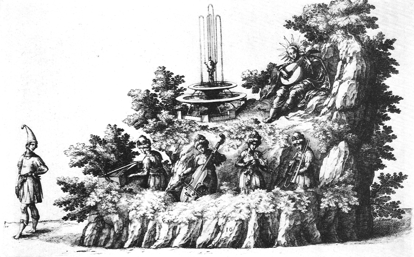 „Der Parnass“ Aufzug des Landgrafen Ludwig von Hessen zum Ringelrennen (Radierung aus dem Band Elias van Hulsen: Delineatio)